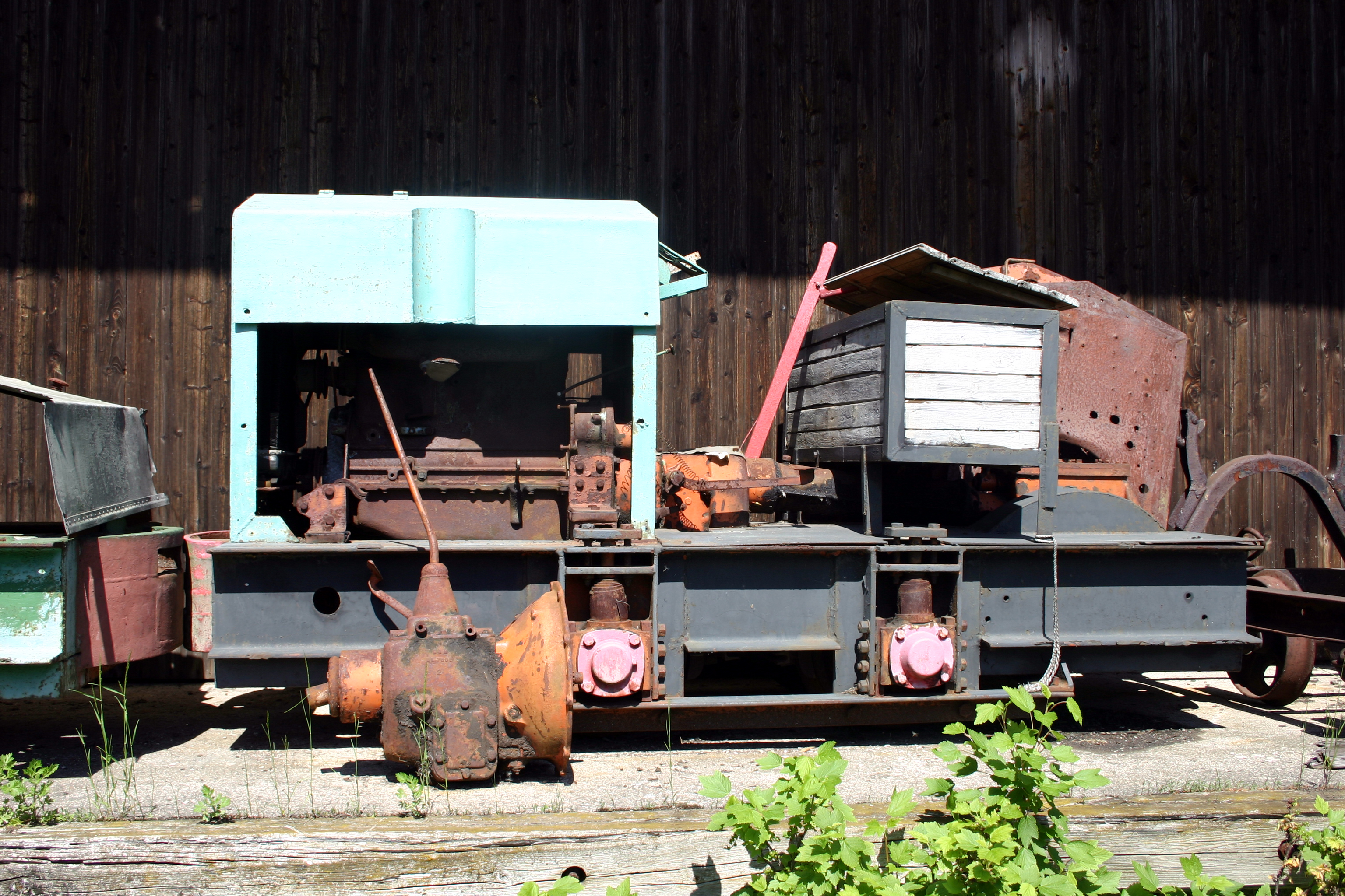 Move1-veturi